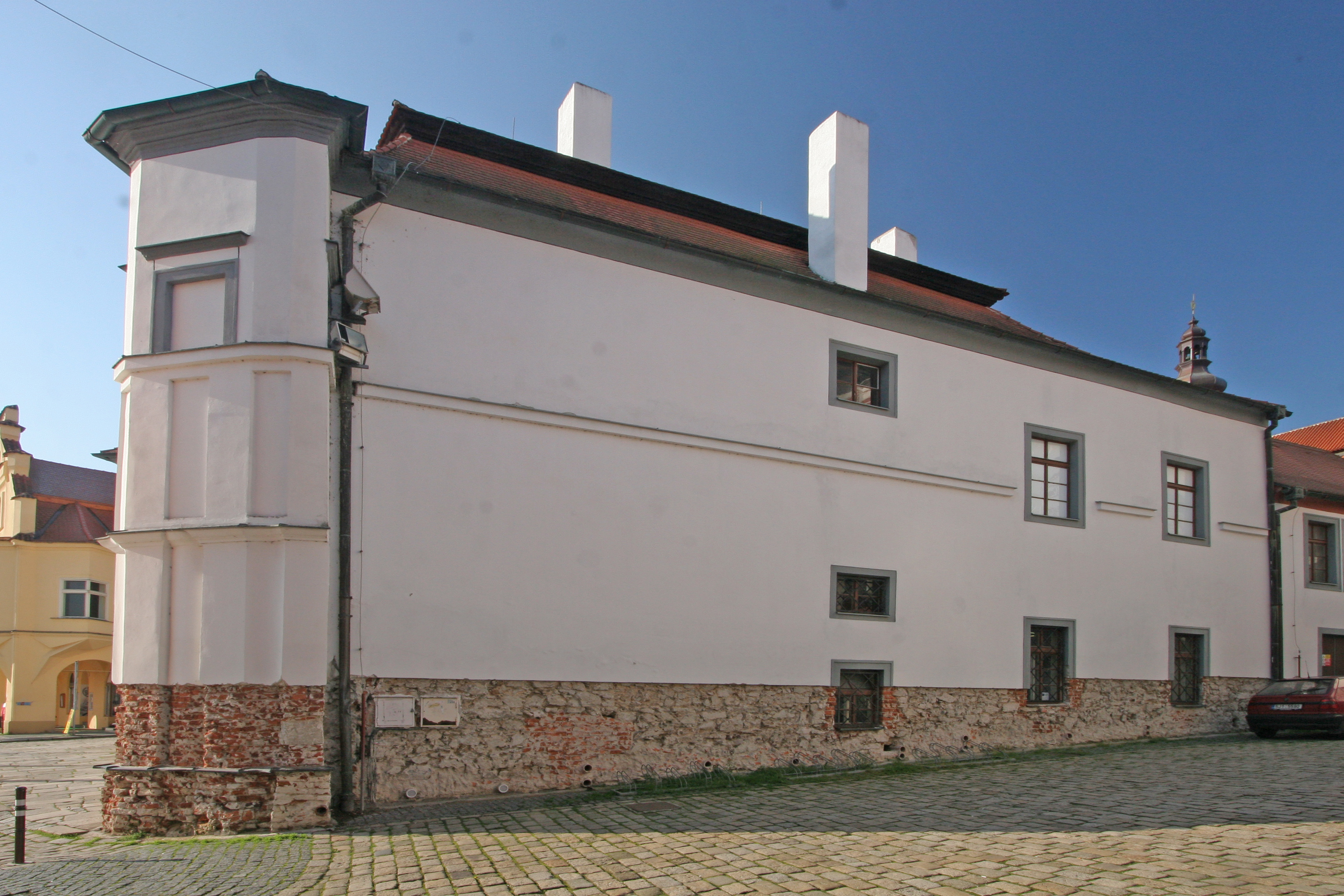 Muzeum, Masarykovo náměstí 10, Pelhřimov.